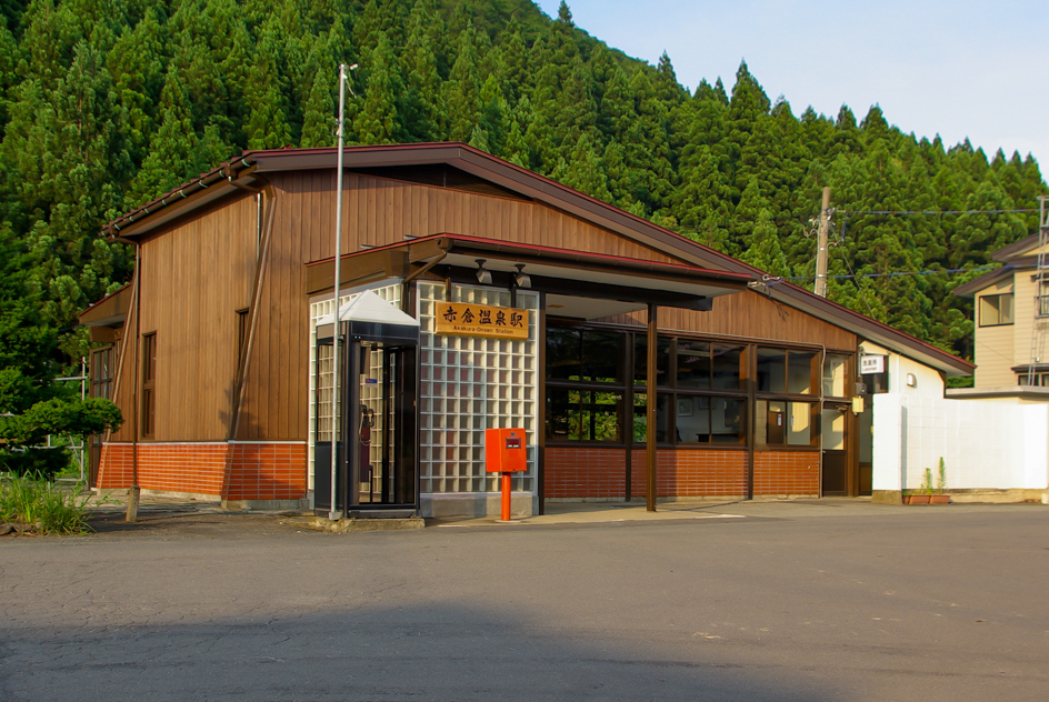 JR陸羽東線赤倉温泉駅